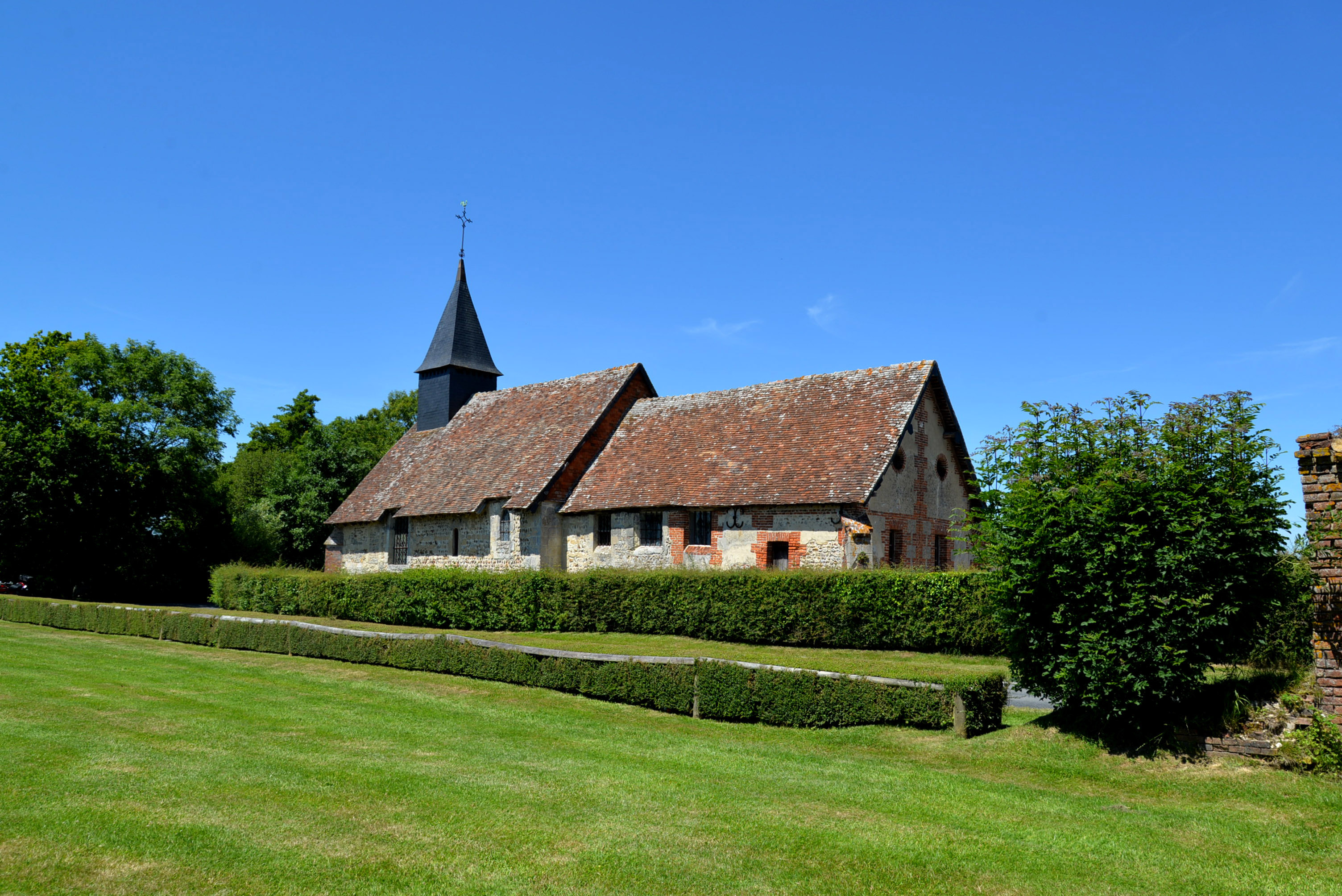 Saint-Désir (Calvados)